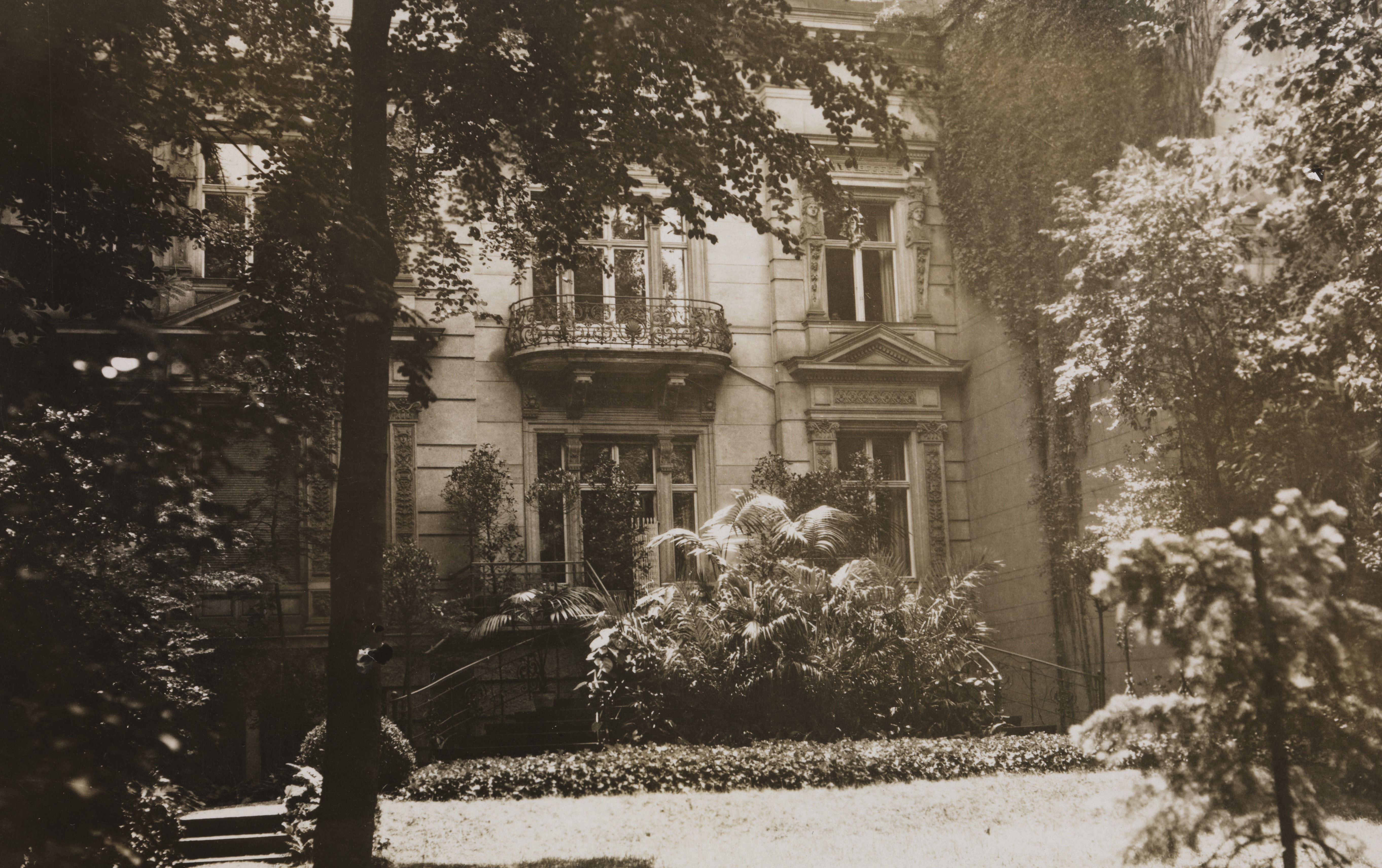 Det Internasjonale Røde Kors i Tiergartenstr. 4 i Berlin. Organisasjonen spilte en nøkkelrolle i utvekslingen av krigsfanger mellom Tyskland og Sovjetunionen etter den første verdenskrig.